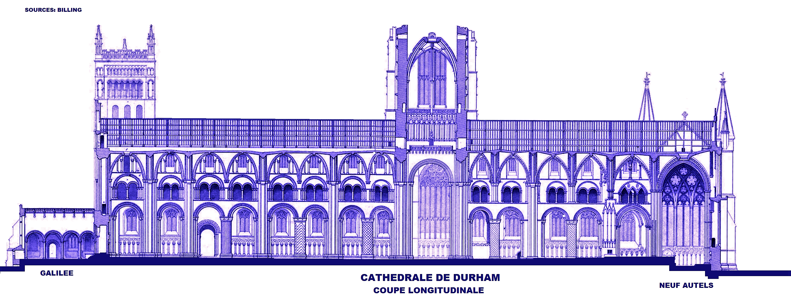 Cathédrale de Durham, Coupe longitudinale (image du domaine public (Billing 1845) modifiée)